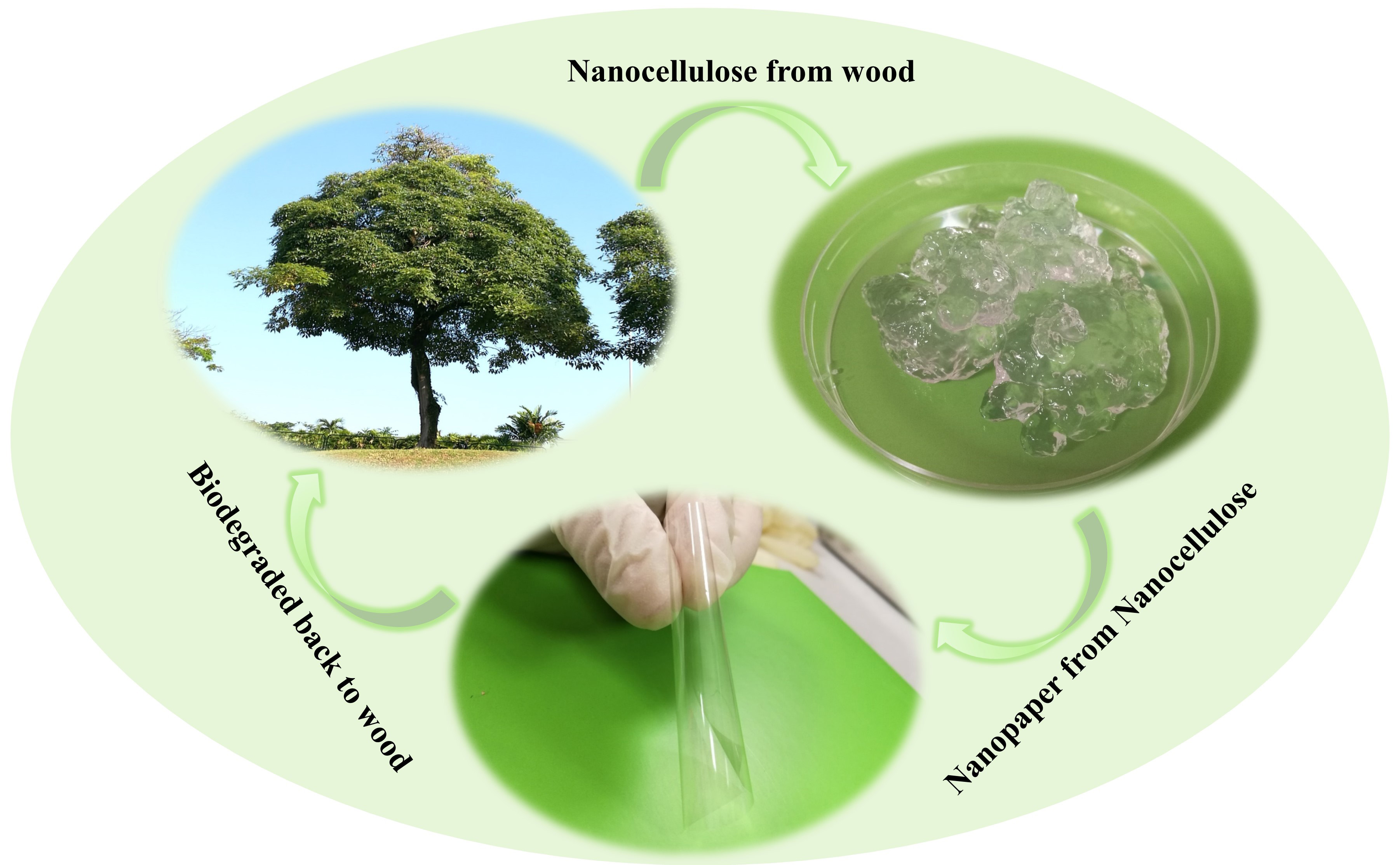 Biodegradation of nanocellulose